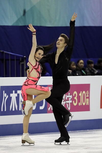 Софья Полищук / Александр Вахнов (Россия) на финале юниорского Гран-при 2017-2018